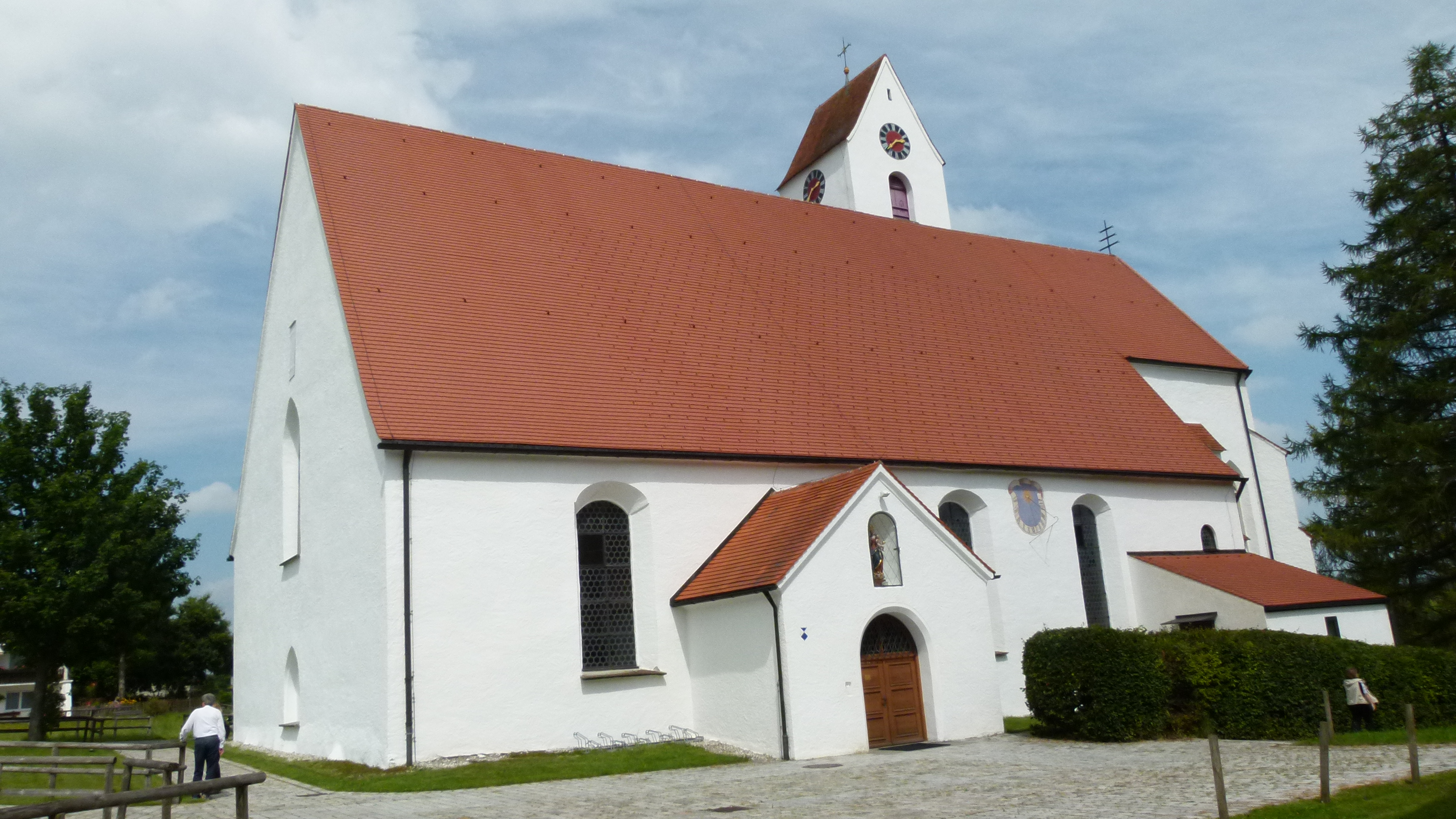 Wallfahrtskirche in Maria Rain, Gemeinde Oy-Mittelberg (Oberallgäu)